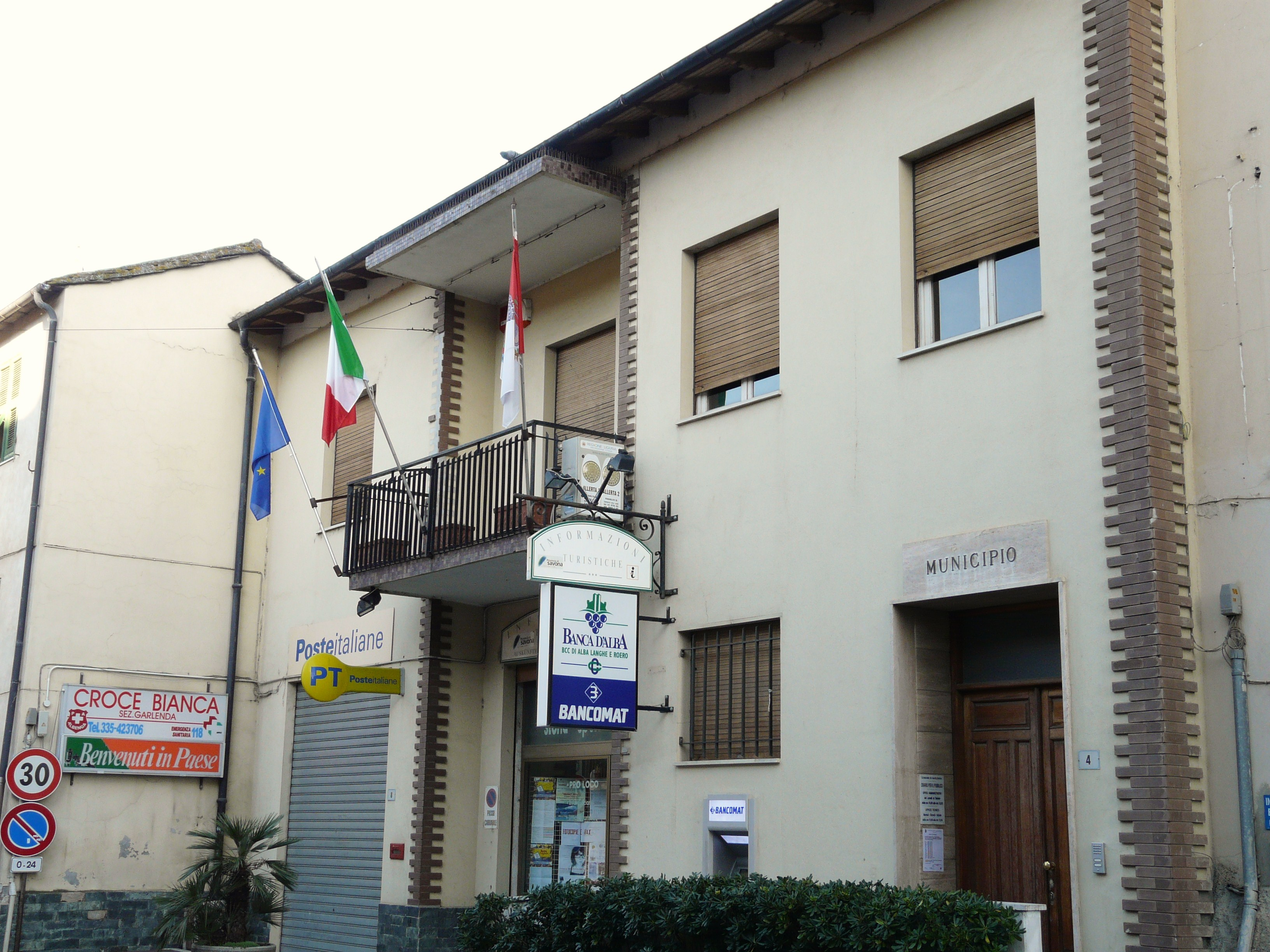 Municipio di Garlenda, Liguria, Italia